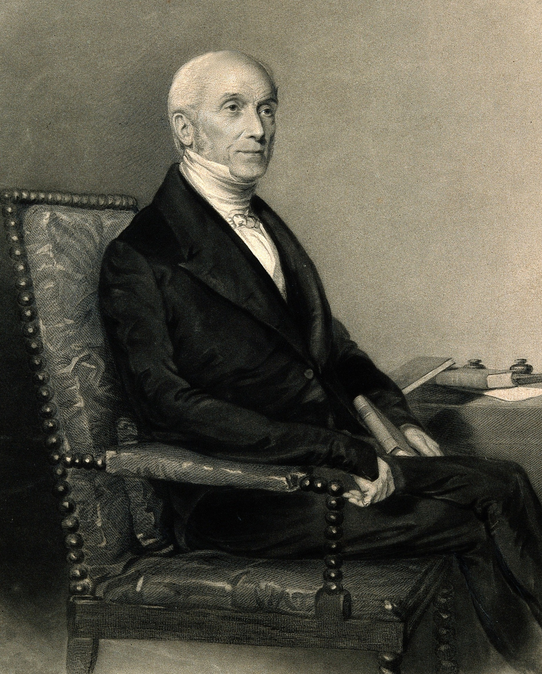 Genre/Technique: Portrait prints. Lithographs. Subject name: Bardsley, Samuel Argent, 1764-1851.